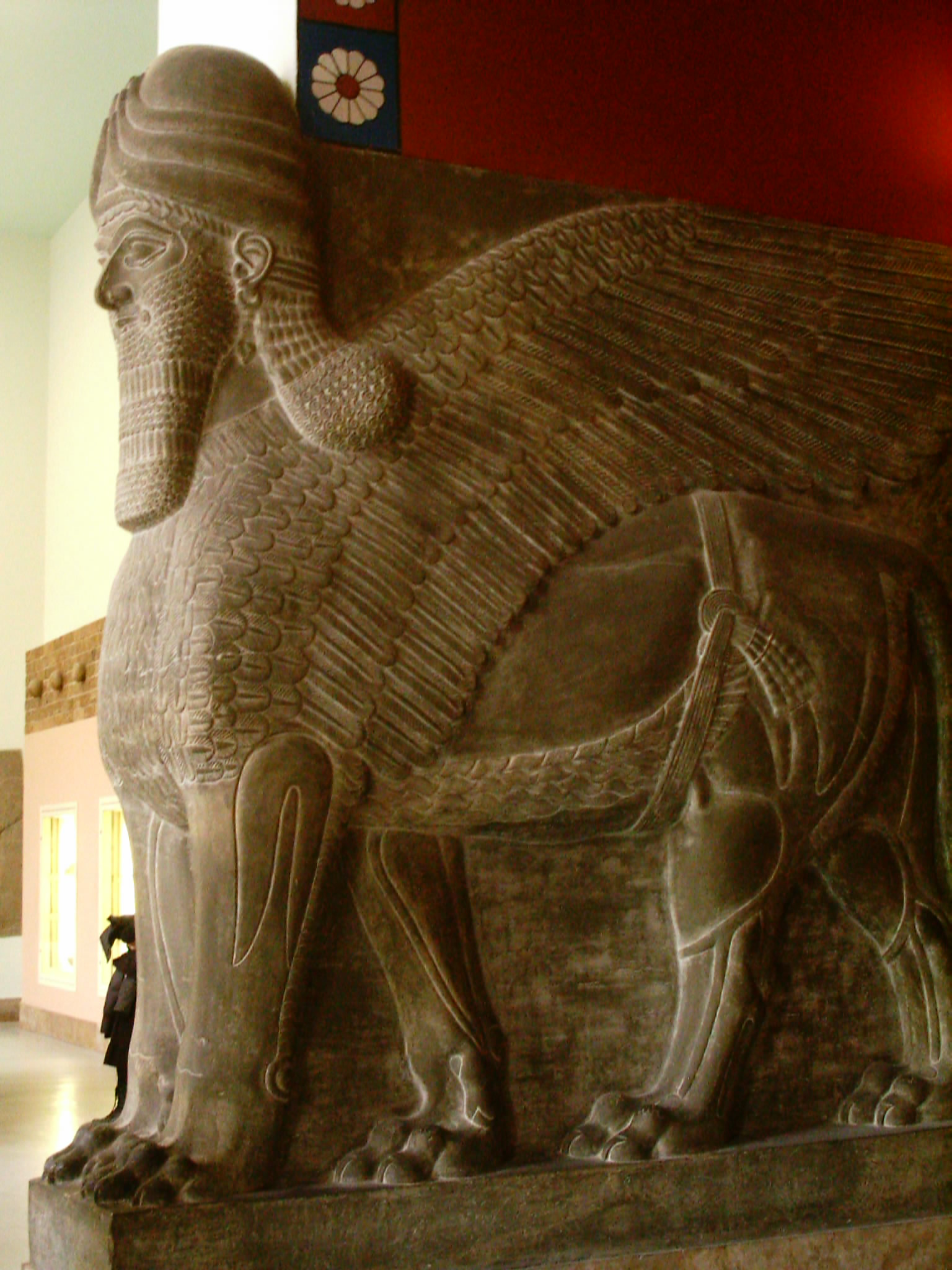 Burgtor, Nimrud. Pergamon Museum, Berlin.